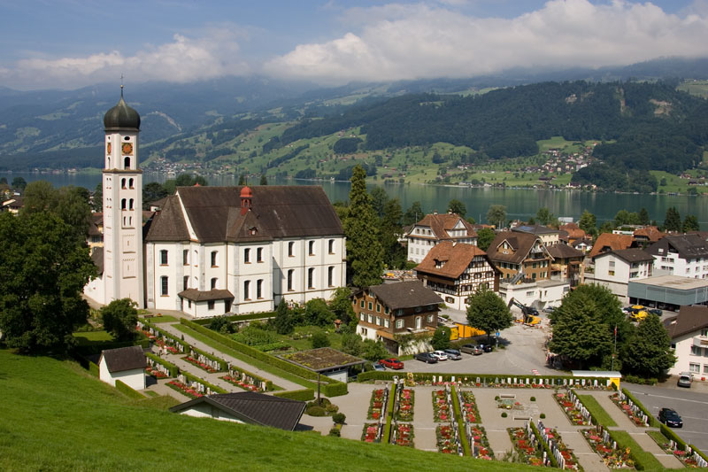 Sachseln am Sarnersee